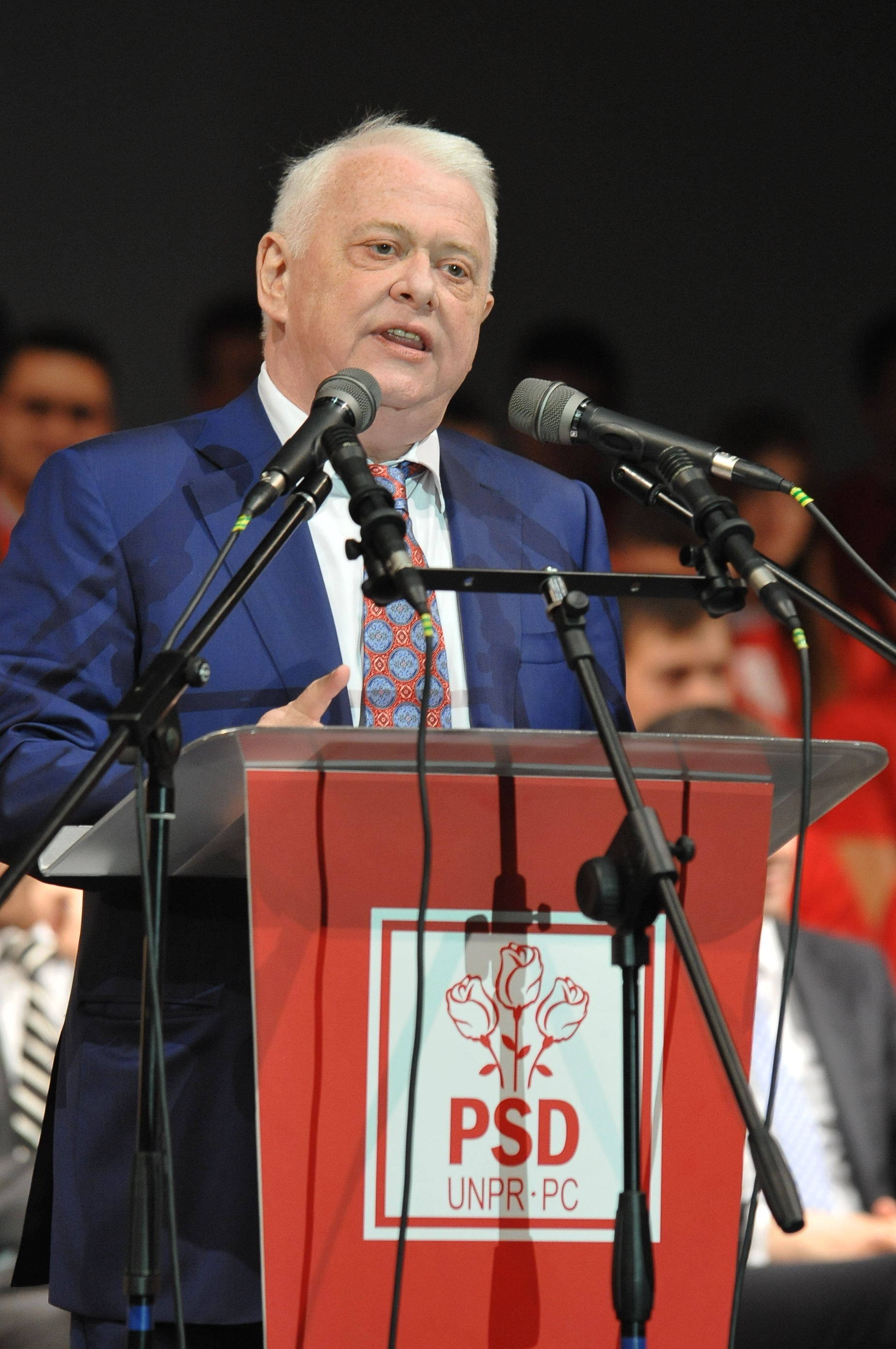 Mitingul Aliantei PSD-UNPR-PC, Bacau - 29 (12)